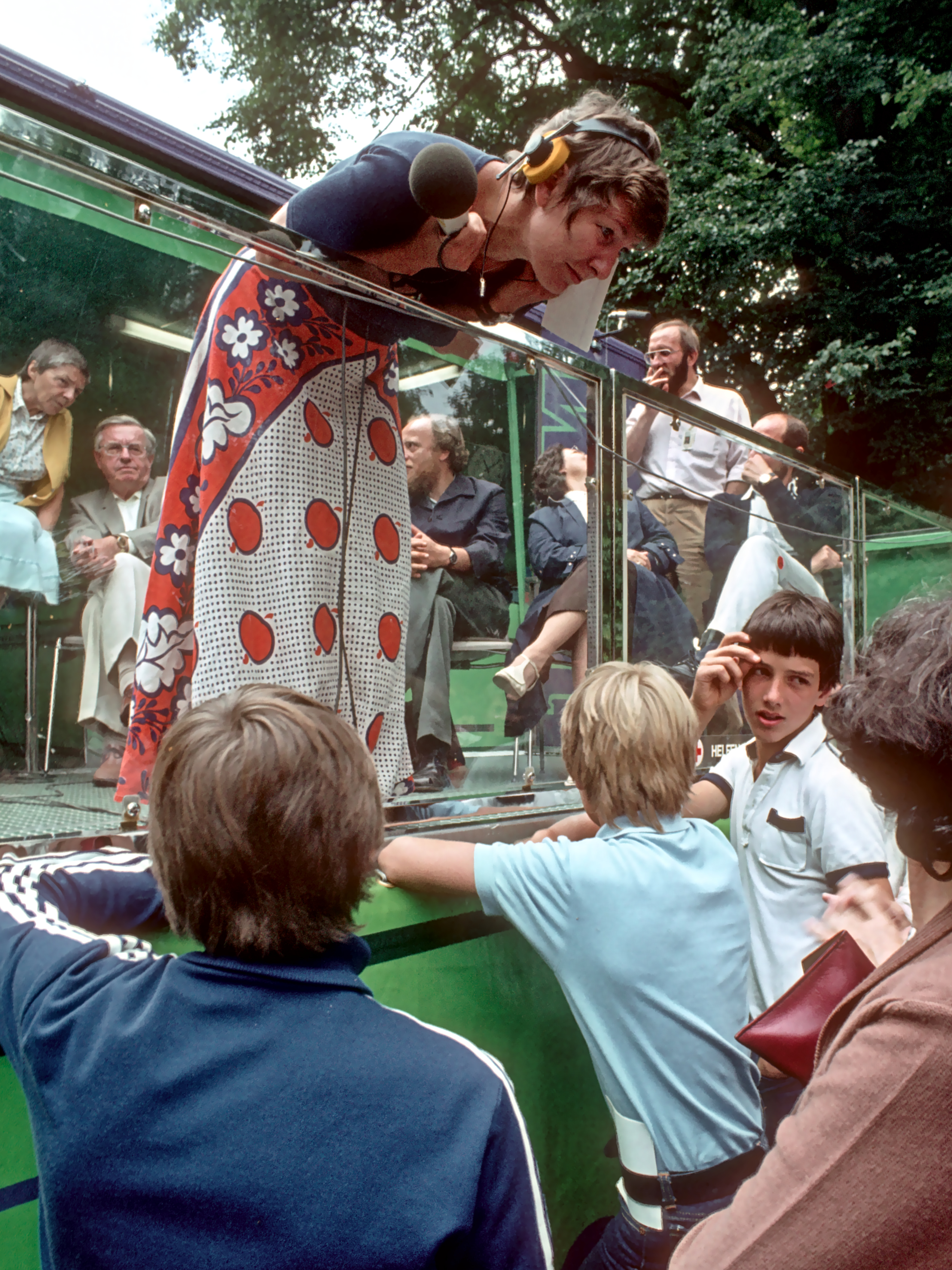 WDR-Hörfunksendung Hallo "Ü-Wagen" am 29.07.1982 in Bad Oeynhausen. Thema "Den Schnecken auf der Schleimspur". Moderatorin Carmen Thomas.